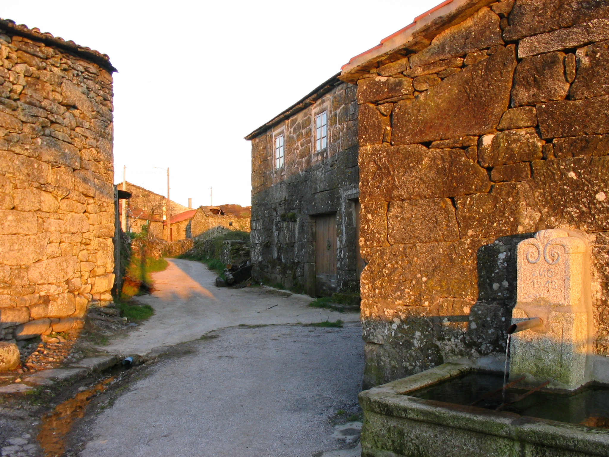 Albergue de peregrinos de LazaIMG_6367